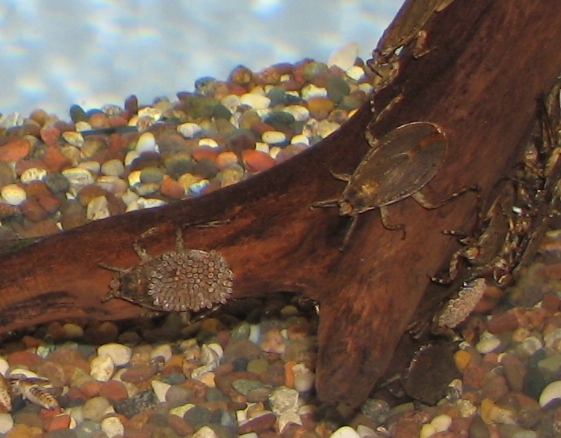 Giant Water Bugs (Abedus herberti)